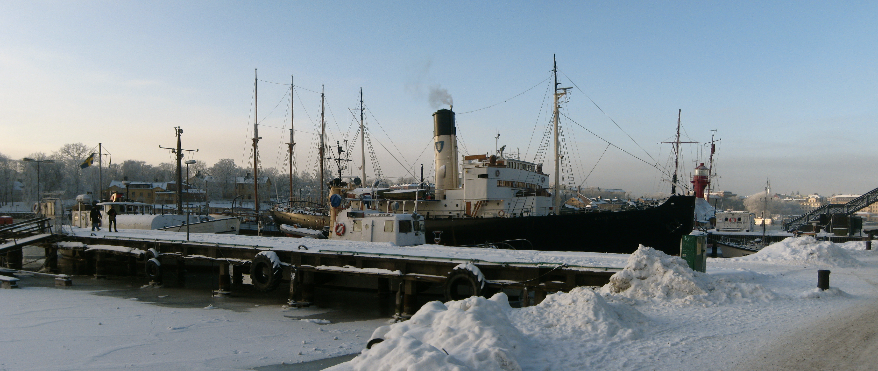 S/S Sankt Erik är en isbrytare, numera ett museifartyg, i Stockholm.